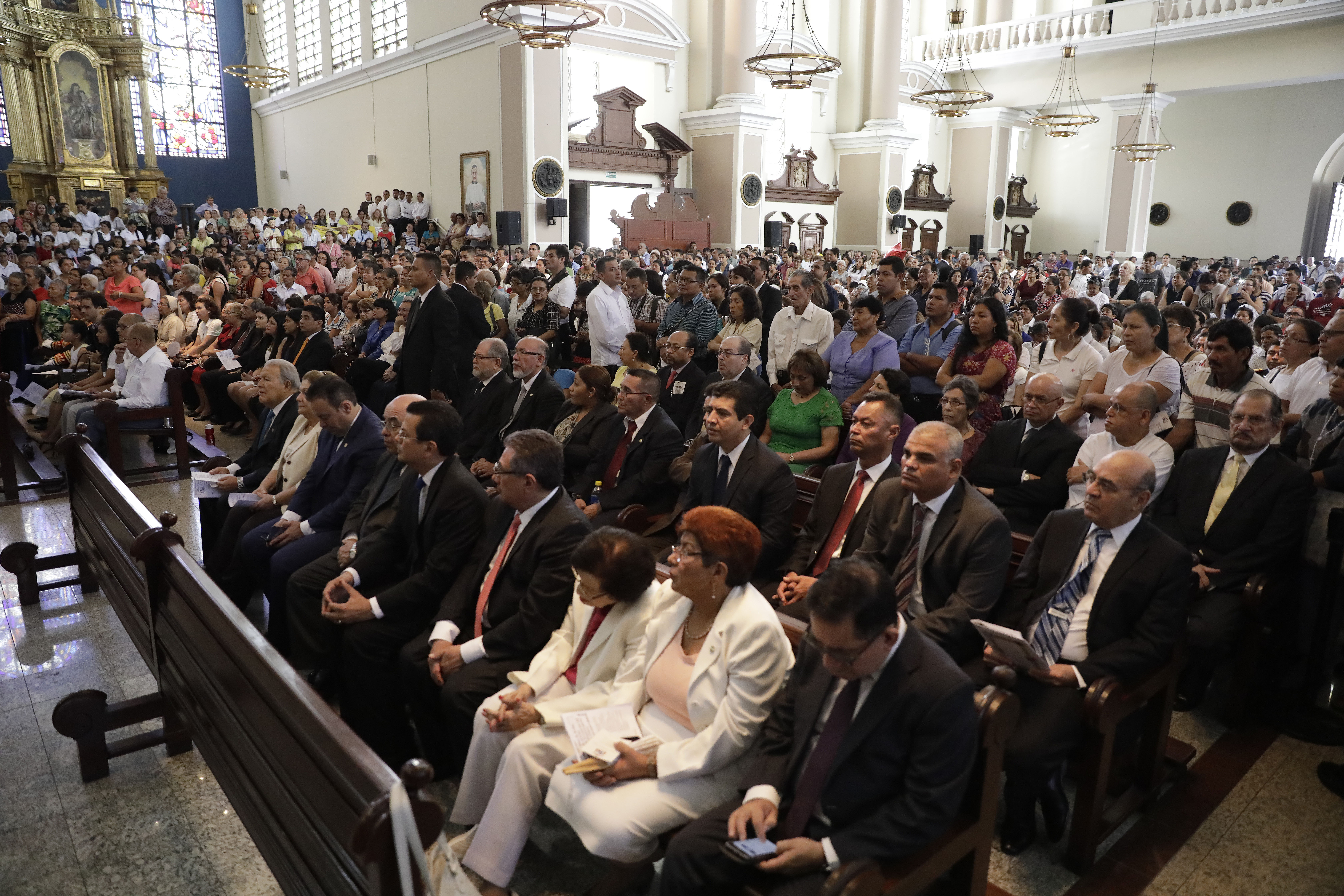 Misa Cardenal Gregorio Rosa Chávez.